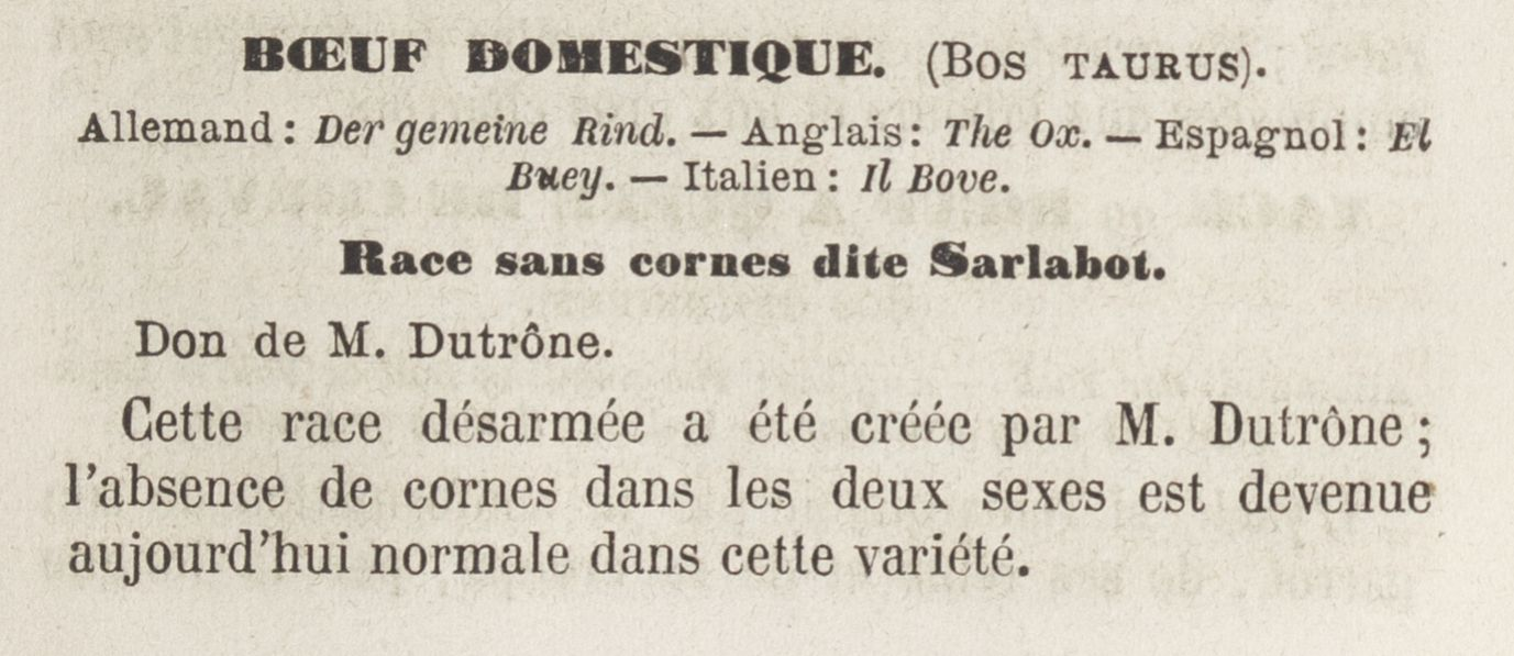 Mention d'un bœuf de race Sarlabot exposé au Jardin d'acclimatation à Paris en mai 1865.